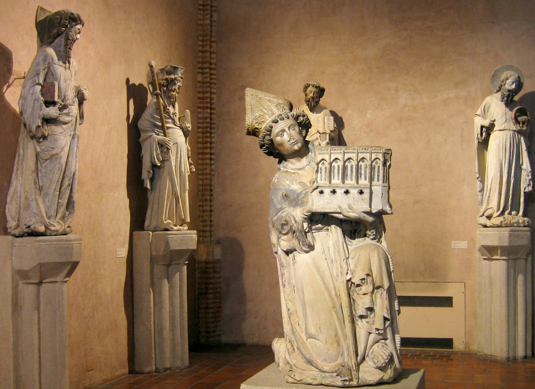 Sculptures du Maître de Rieux, Musée des Augustins, Toulouse